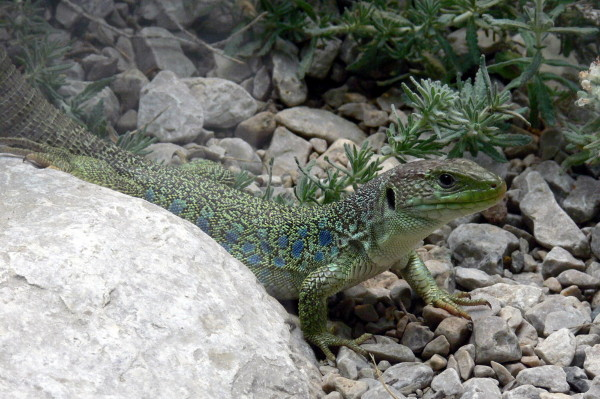 Timon lepidus